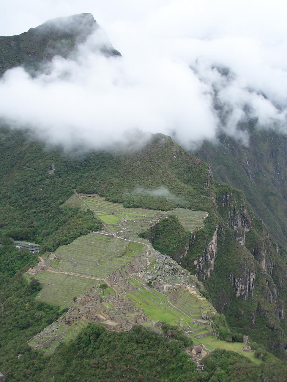 Vista de Machu Picchu tomada desde el cercano cerro de Wayna Picchu